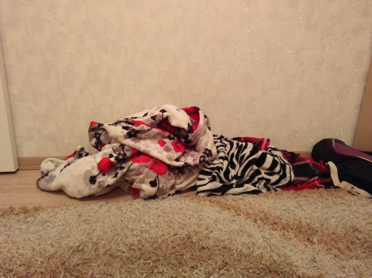 Красно белый плед